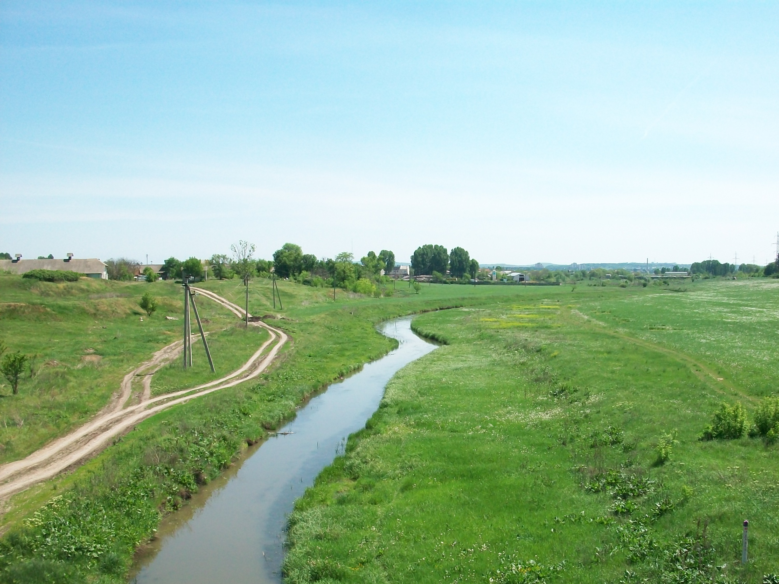 Râul Răut în Bălţi